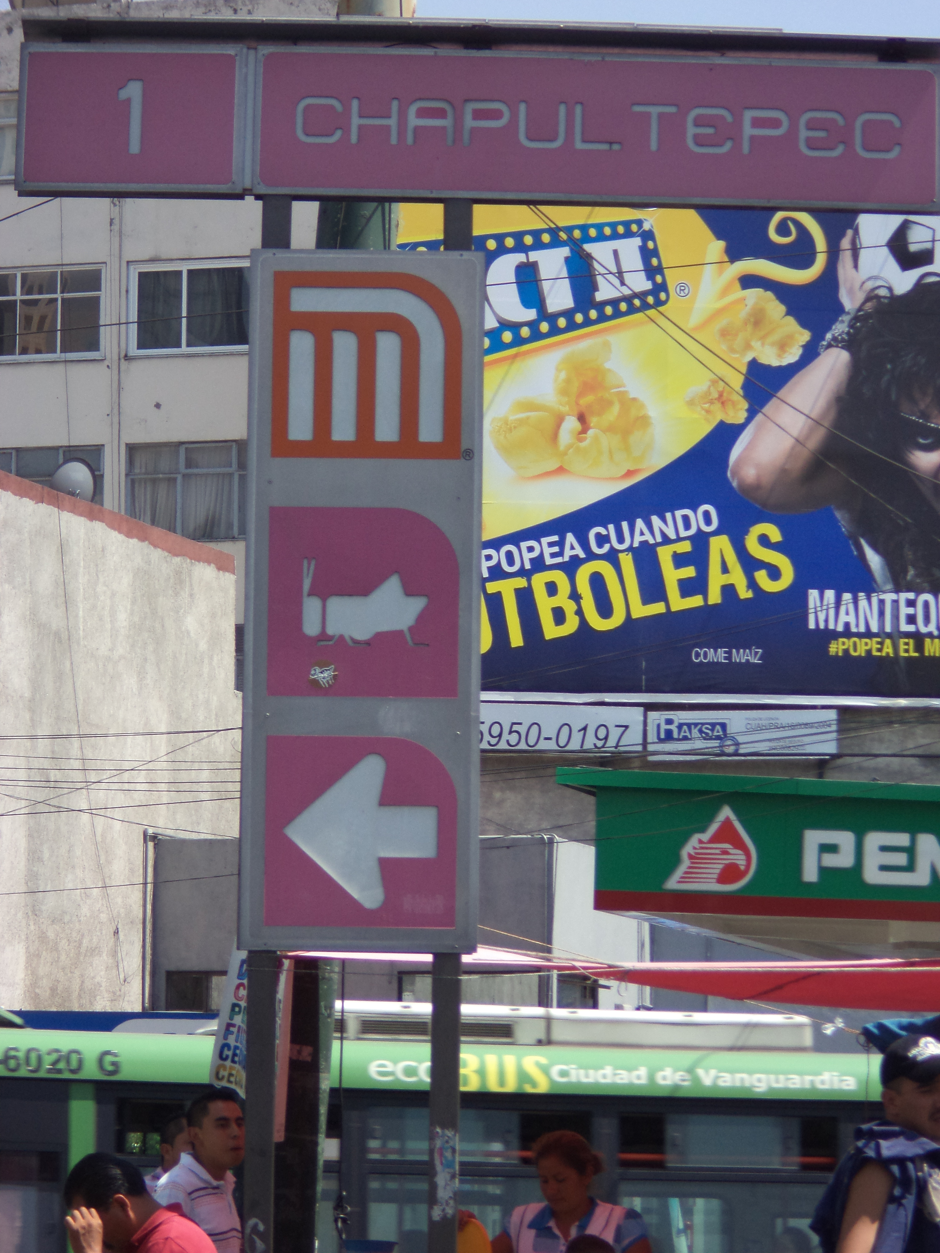 Estela metro chapultepec